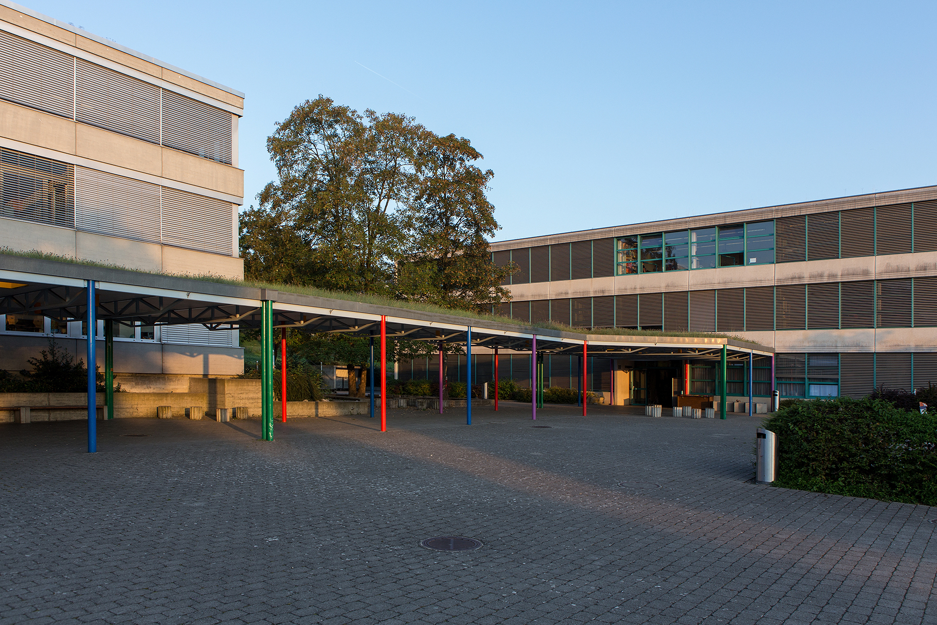 Die beiden Schulhäuser Hertimatt 2 und 1 in Seon (AG)